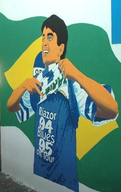 Mural de Bebeto (uno de los mayores ídolos deportivistas) en el estadio de Riazor.